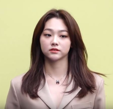 '구구단' 미나가 18일 오후 서울 중구 을지로 동대문디자인플라자(DDP)에서 열린 ‘엘엘이이 서울 패션위크 S/S 2020 컬렉션’에 참석했다.